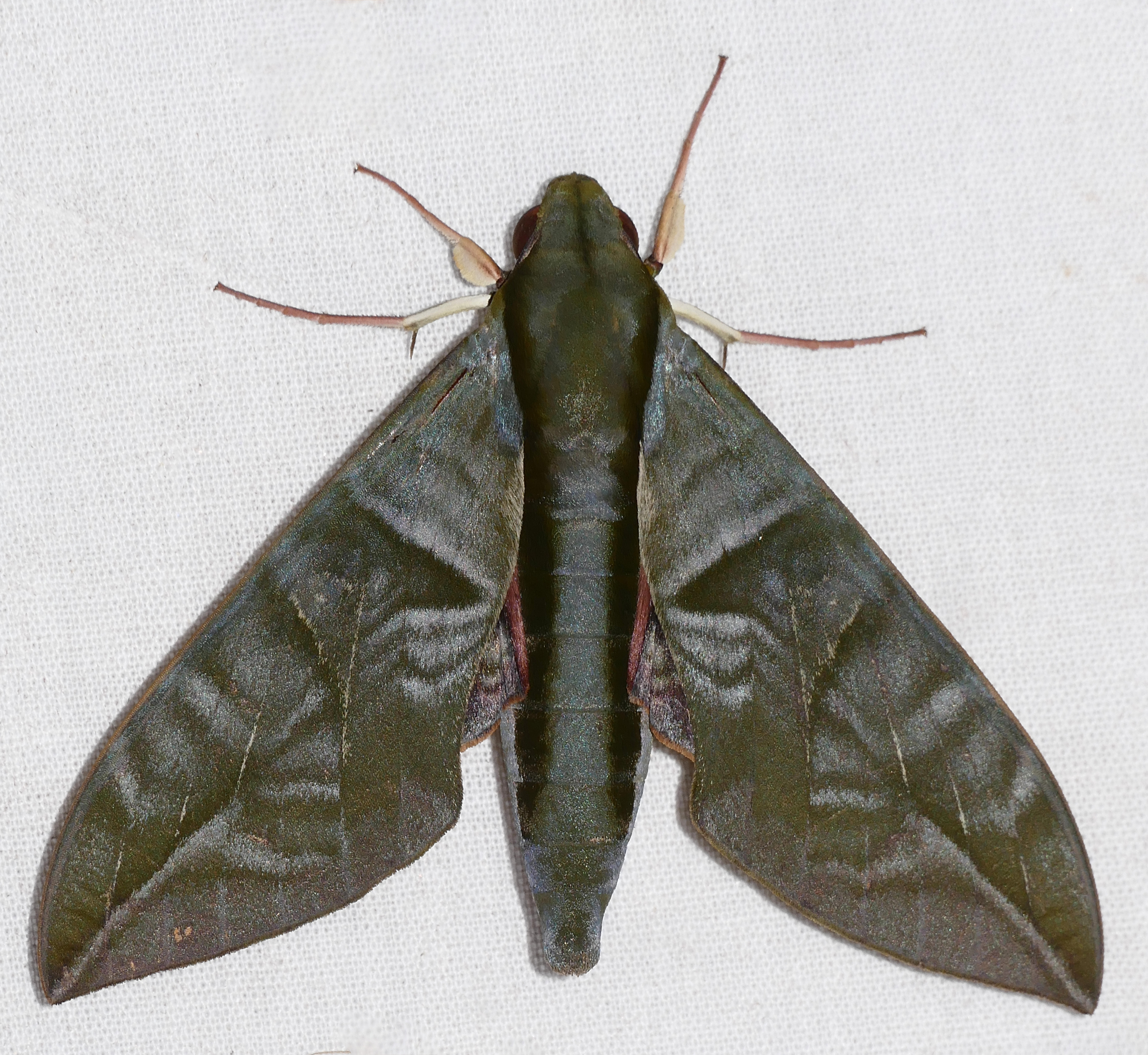 Piste de Belizon, Roura, French Guyana, FRANCE